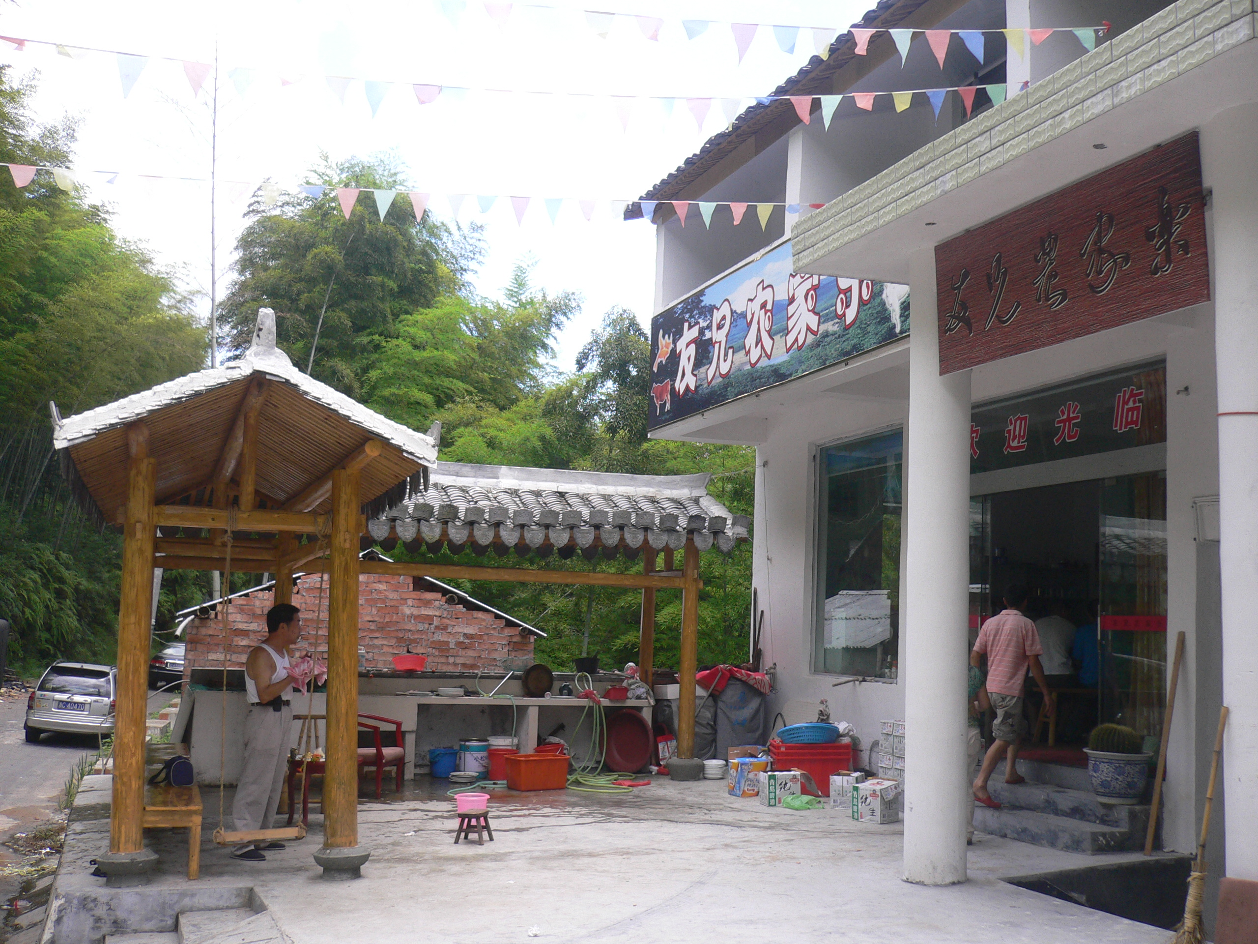 友兄农家乐